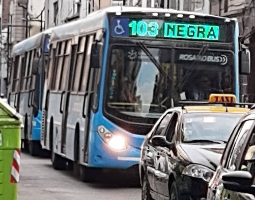 Mercedes-Benz perteneciente a la línea 103, en su variante "negra". La línea 103 es explotada por Rosario Bus.